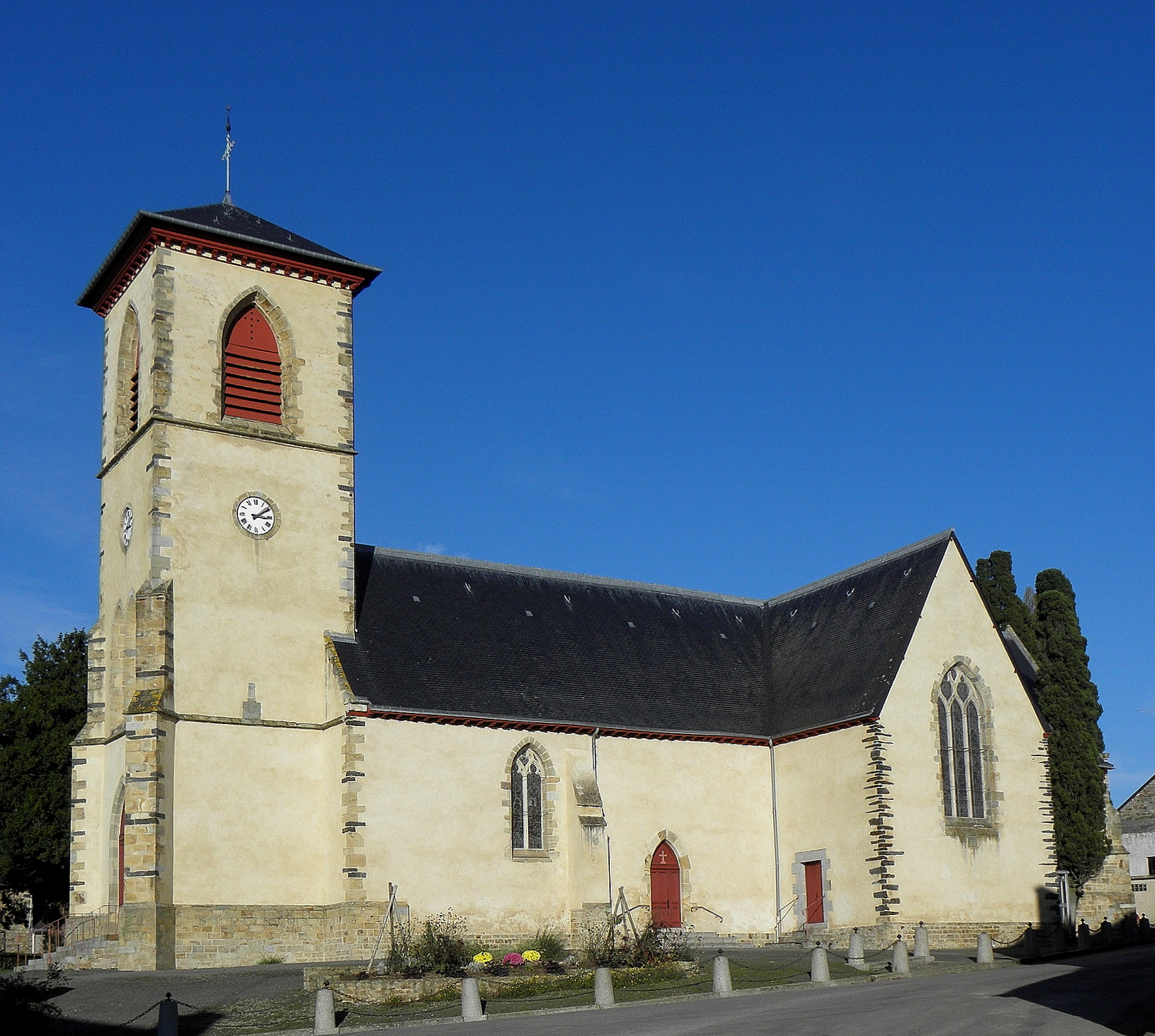 Église Notre-Dame-de-la-Visitation, commune de Vergéal (35). Vue méridionale.